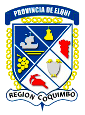 Escudo de armas de la Provincia de Elqui, en la Región de Coquimbo (Chile)